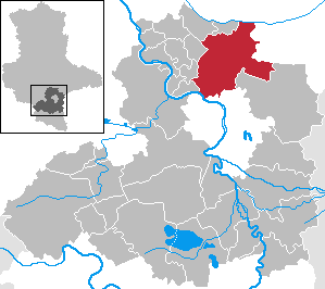 Petersberg in Saxony-Anhalt - Saalekreis